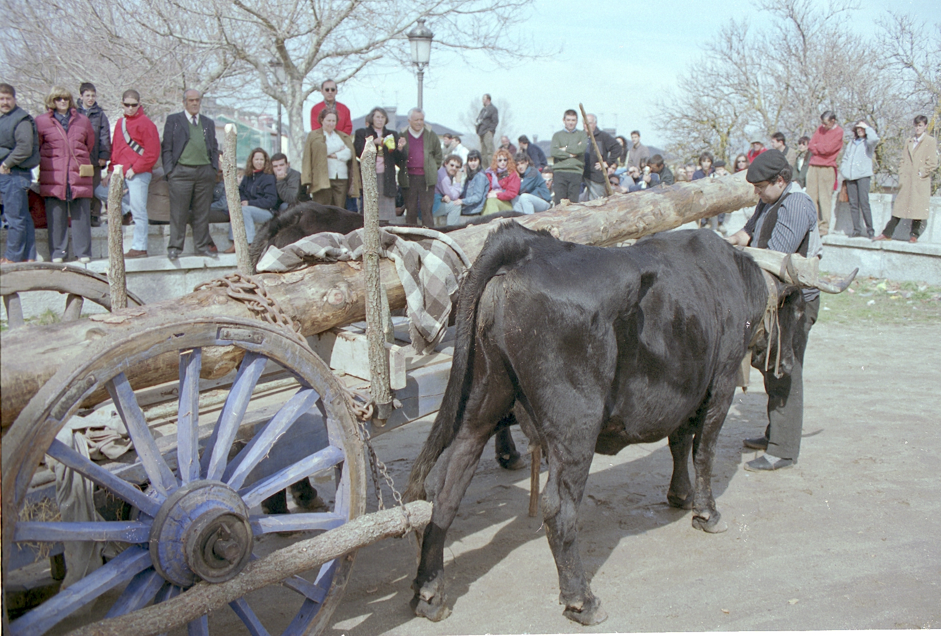 Troncos de pino transportados en un carro tirado por bueyes dentro de la celebración de la Fiesta de los Gabarreros